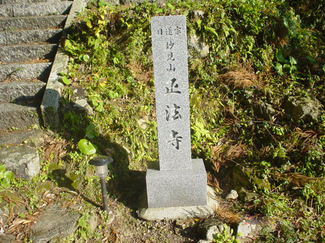 (三重県熊野市にある正法寺 (熊野市)。2007/12/2 投稿者が撮影